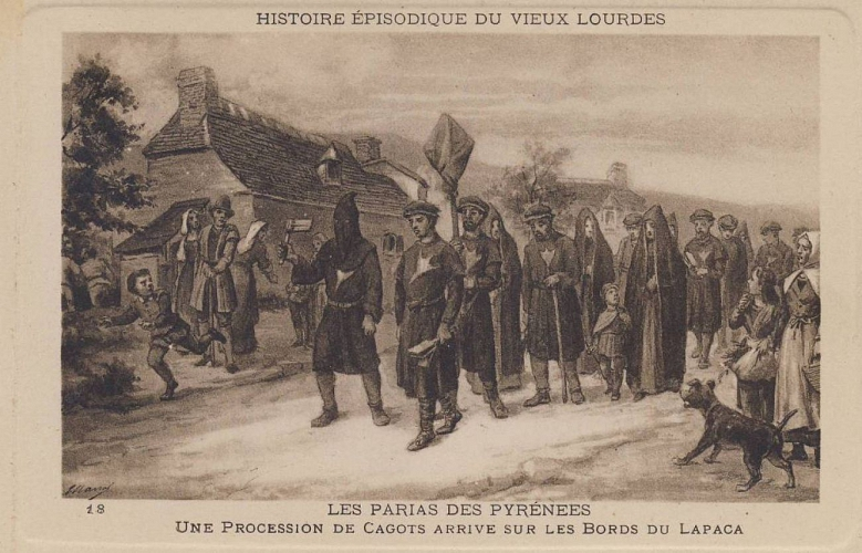 Une procession de cagots arrive sur les bords du Lapaca